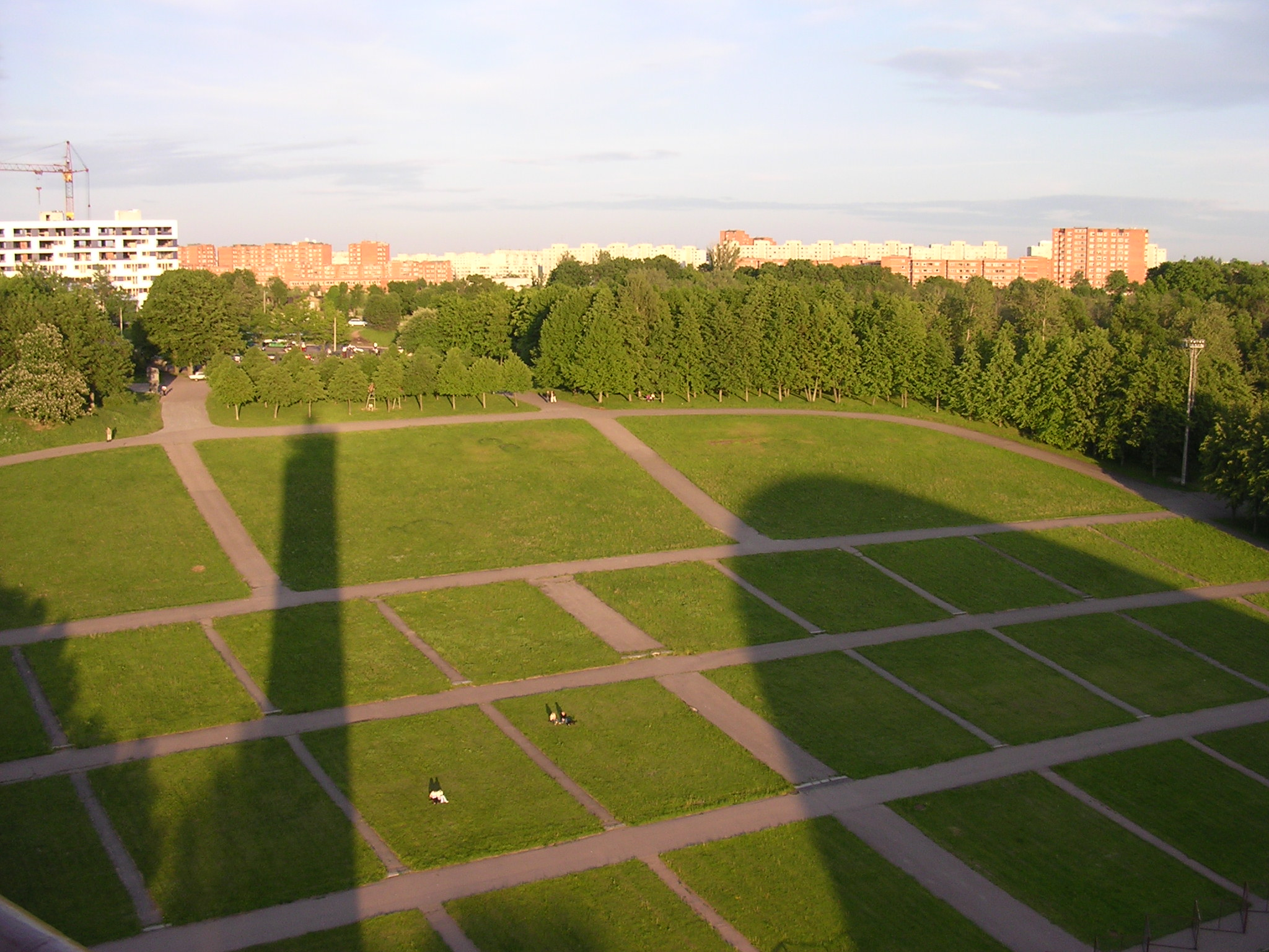 Lauluväljak laulupeo tule tornist